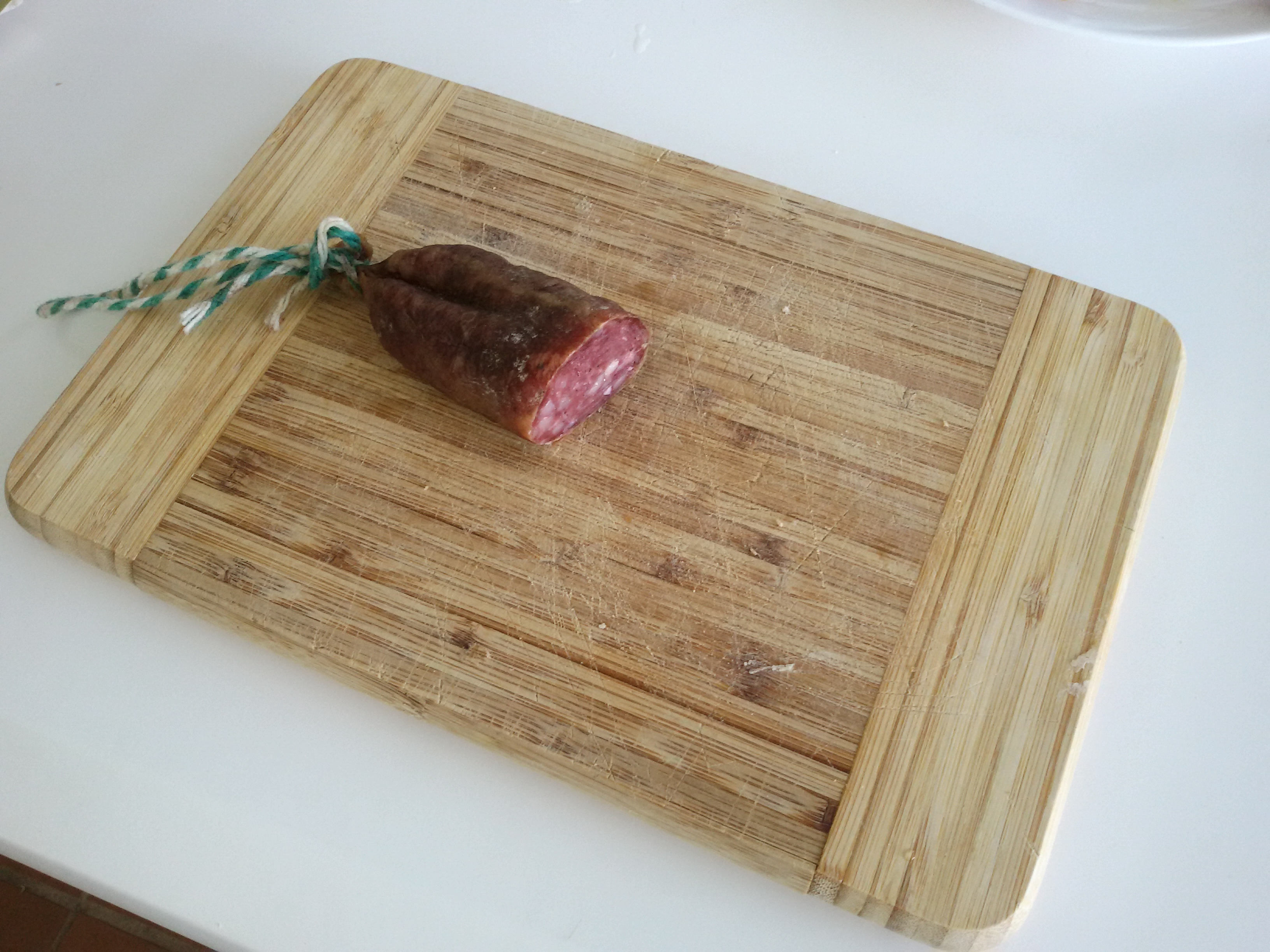 Carn-i-Xulla Carnixulla embutido de Menorca Islas Baleares España